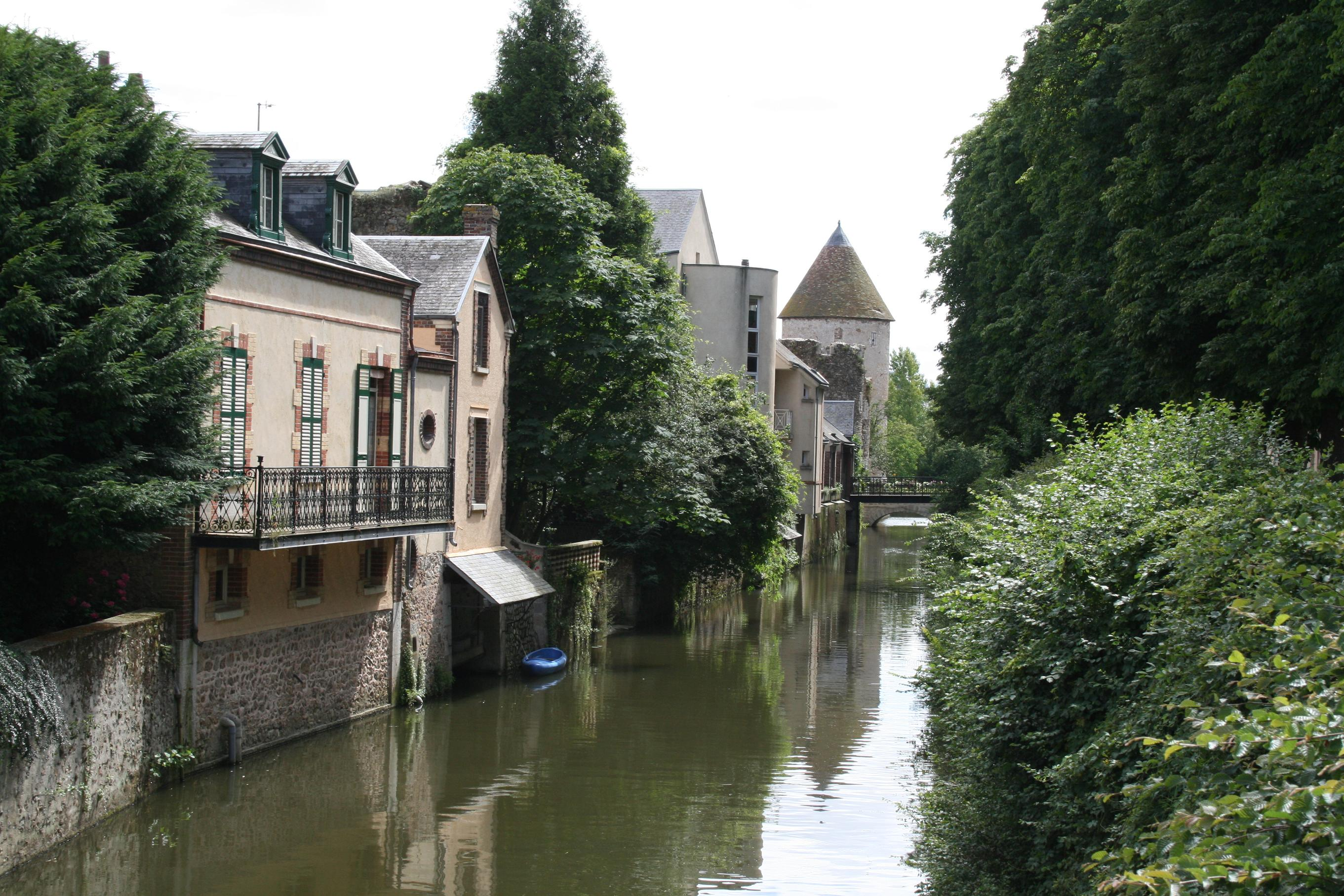 Bonneval (Eure-et-Loir - France) - Vue du canal.